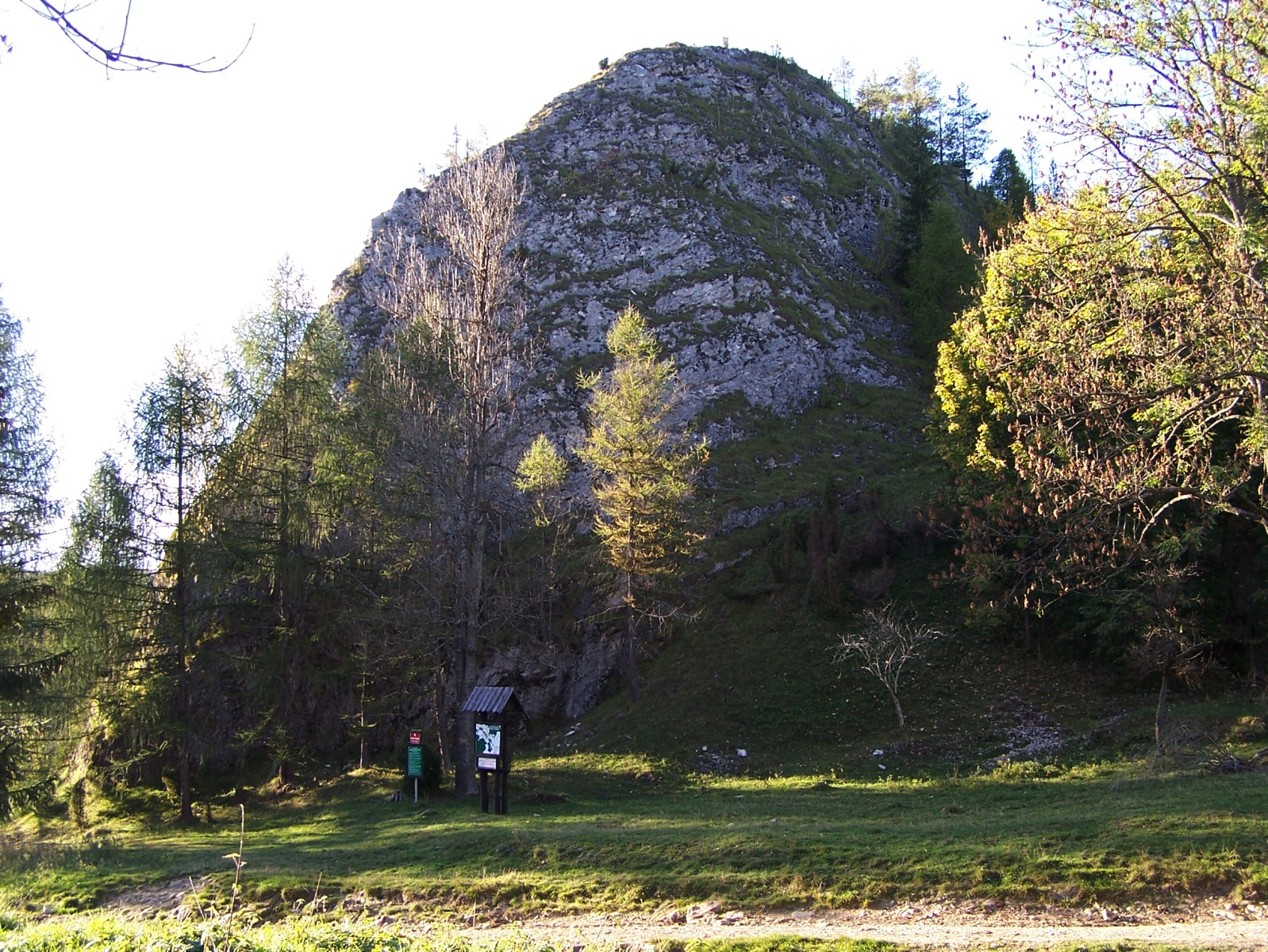 Kociubylska skała (Dolina Biała Woda, Małe Pieniny)